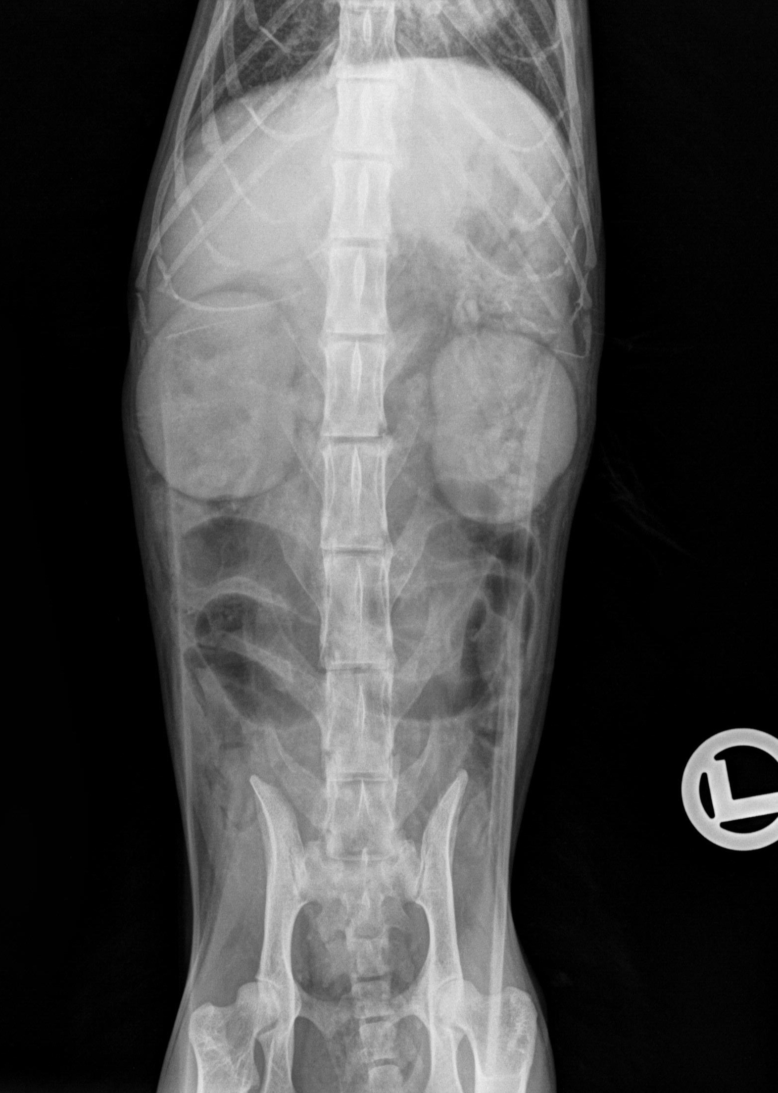 CNI, vermutlich aufgrund einer interstitiellen Nephritis. AP-Projektion, nach i.v.-Injektion eines jodhaltigen Kontrastmittels. Beachte die diffuse Darstellung des Nierenparenchyms ("Parenchymphase"). Zur Ausscheidung mit Darstellung eines Pyelogramms ("Ausscheidungsphase") kam es nicht mehr (Nierenversagen).